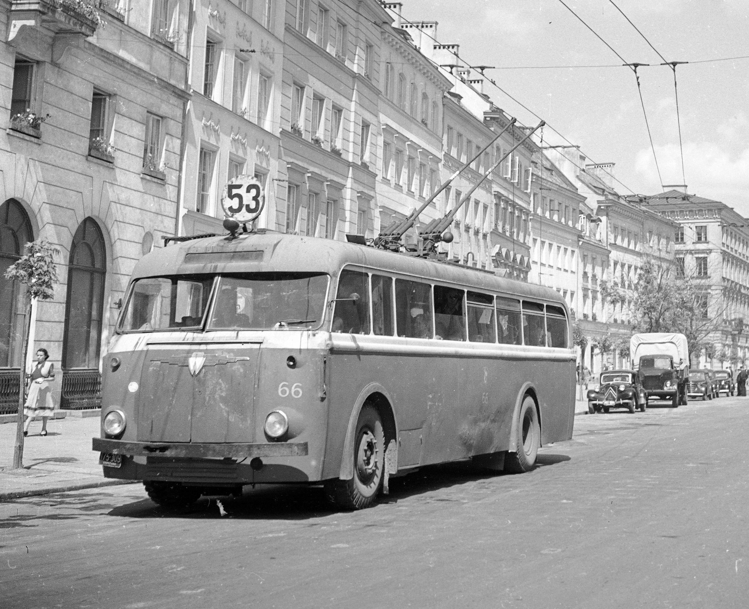 Trolejbus marki Lowa na linii 53 (numer boczny 66). Widok w kierunku placu Zamkowego.